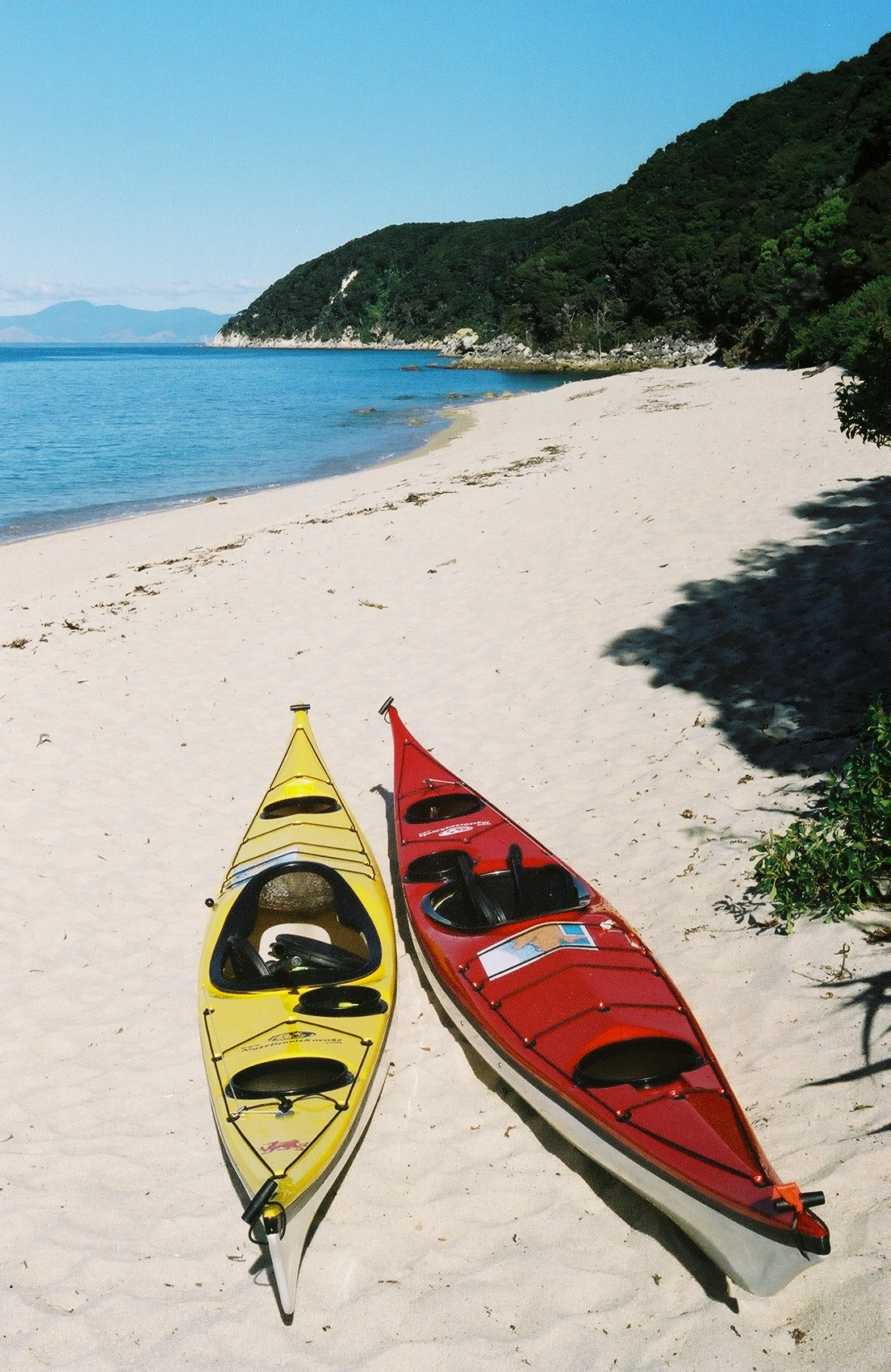 Two sea kayaks in Abel Tasman National Park, a popular sea kayaking destination in New Zealand.